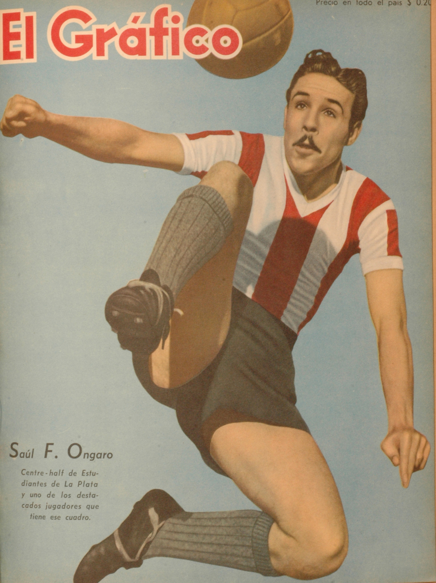 El Grafico del 18 de Junio de 1943. Edicion 1249